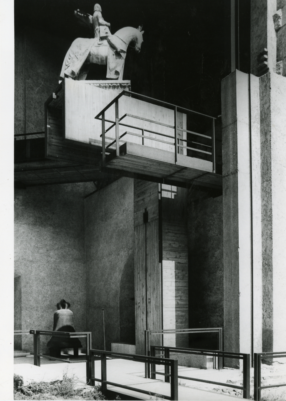 Verona. Museo civico di Castelvecchio. Esterni. Statua equestre di Cangrande su pilastro aggettante. Servizio fotografico : Venezia, 1982 / Paolo Monti. - Stampe: 3 : Positivo b/n, gelatina bromuro d'argento/ carta, 24x30. - ((Al verso delle stampe manoscritti i numeri dei negativi corrispondenti (formato 35 mm) con indicazione del fotogramma (dal rullo 3866 al 3867). - Sul coperchio della scatola iscrizione didascalica manoscritta a pennarello nero: "Verona". - Fonte: Agenda di Paolo Monti: Nikon Leika 3001-/ Monti 1978 (1978-1982), presso Archivio Paolo Monti